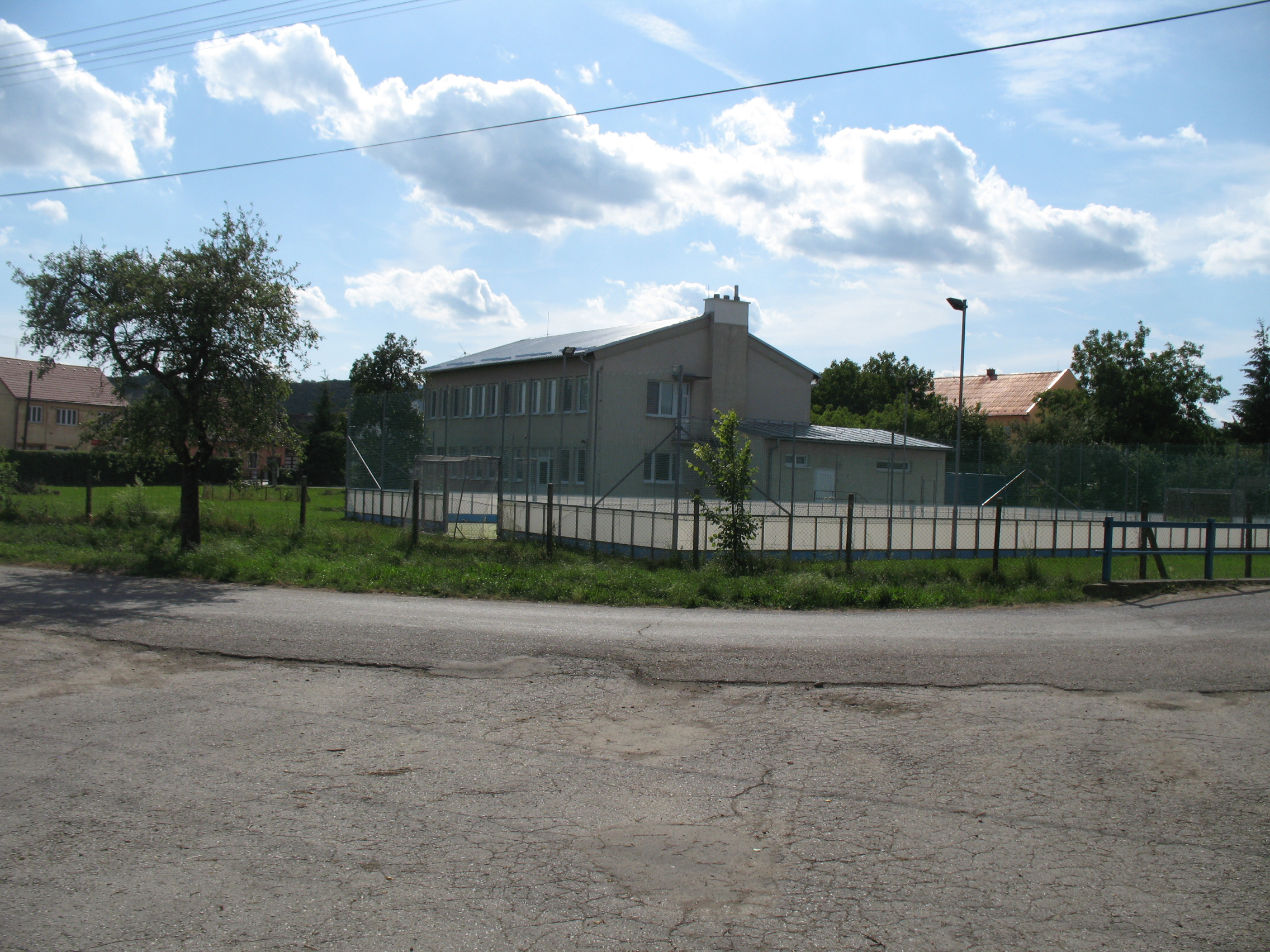 Bobót